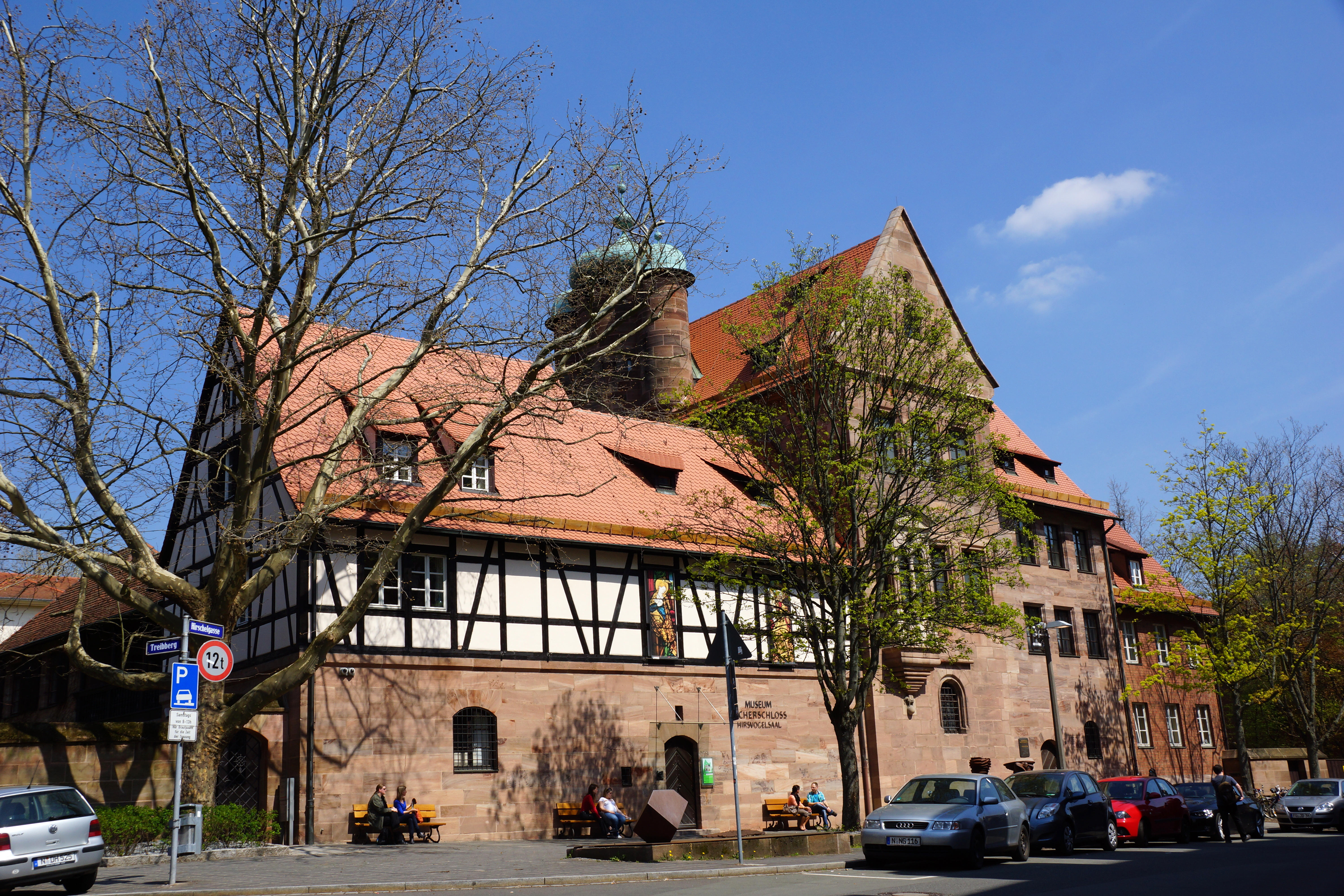 Tucherschloss Nürnberg von Süden